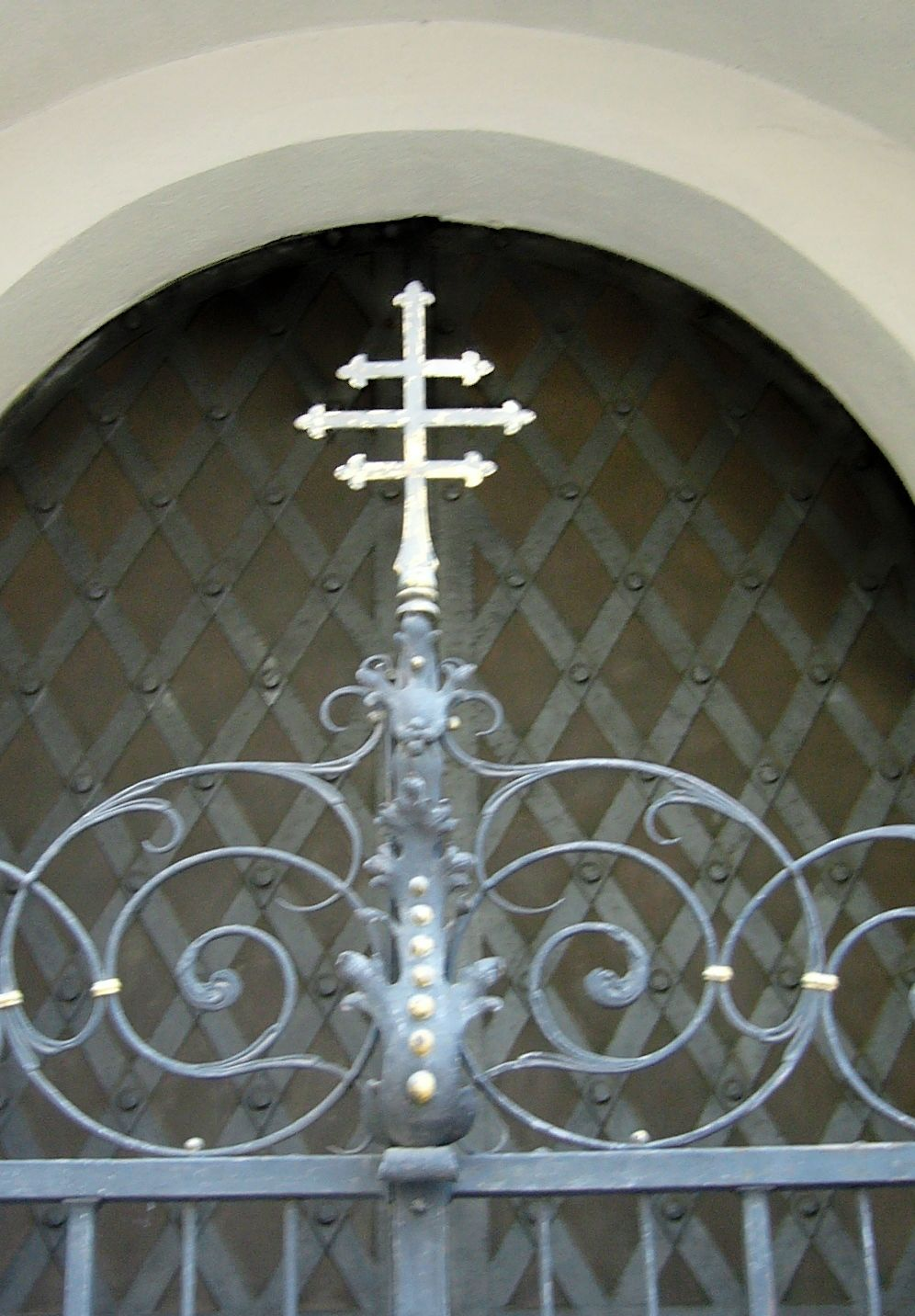 Triple cross (Dreifachkreuz), seen at St. Peter church in München, Germany